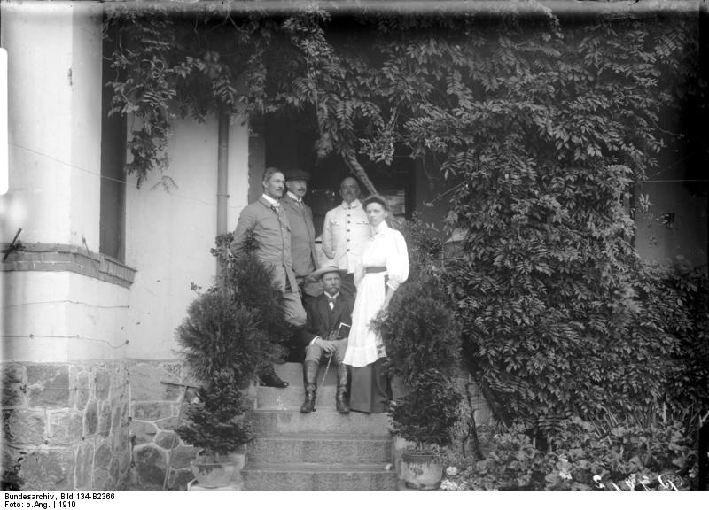 Schutzgebiet Kiautschou Tsingtau 1910: Oberförsterei